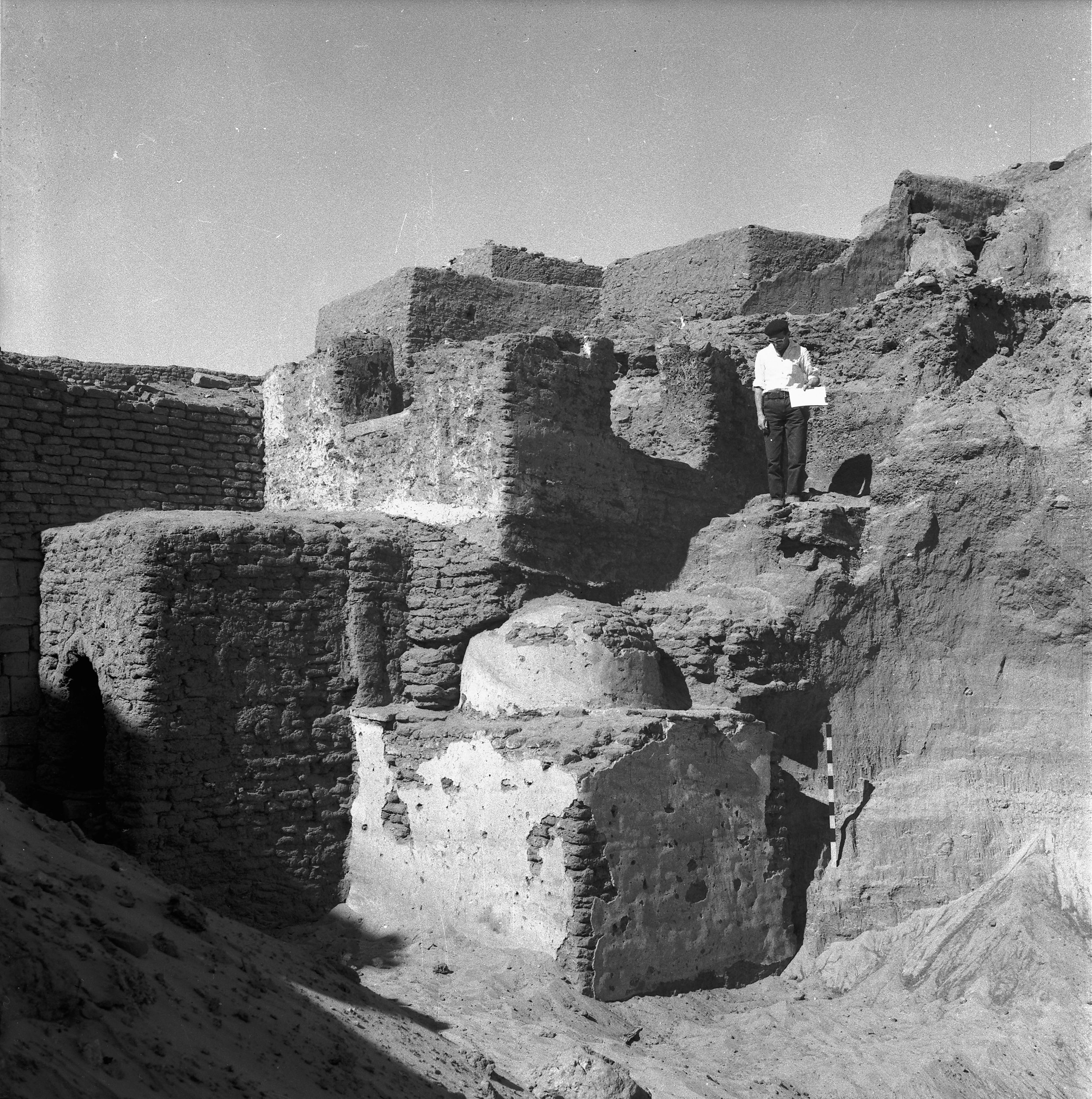 Wykopaliska w Faras